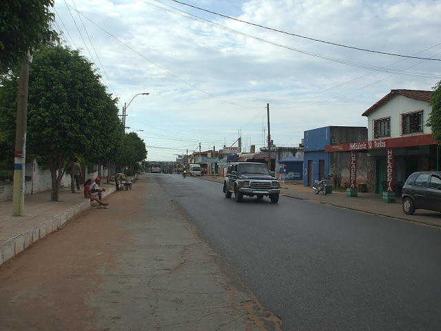 Calles de la Ciudad de Limpio